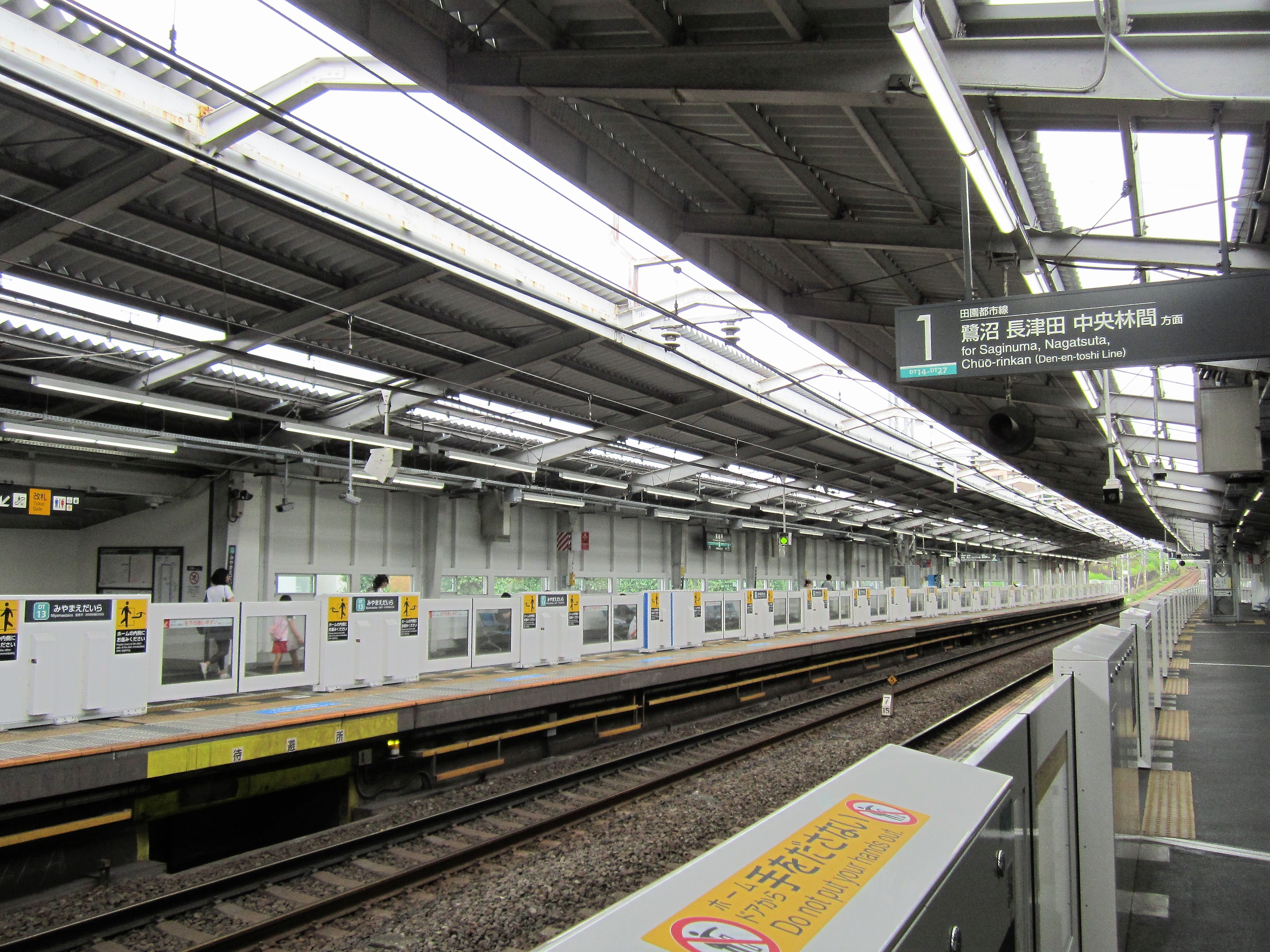 宮前平駅ホーム